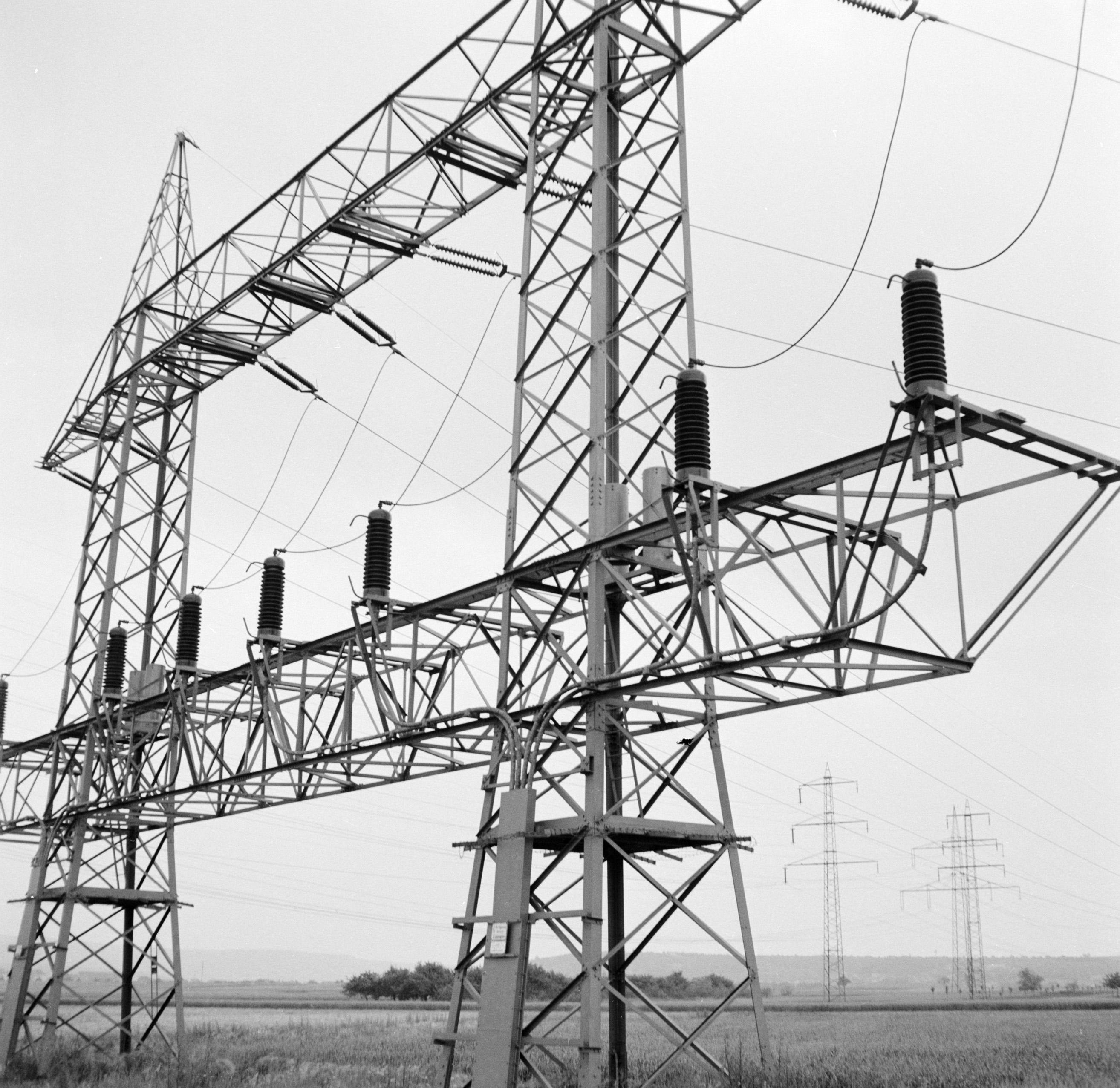 Collectie / Archief : Fotocollectie Van de Poll Reportage / Serie : Rijnvaart, reportage vanaf sleepboot Damco 9: West-Duitsland Beschrijving : Hoogspanningsmast met isolatoren en elektriciteitsleidingen nabij Koblenz Datum : 1 april 1955 Locatie : Duitsland, Koblenz, West-Duitsland Trefwoorden : elektriciteit, hoogspanningsmasten, landschappen Fotograaf : Poll, Willem van de Auteursrechthebbende : Nationaal Archief Materiaalsoort : Negatief (6x6) Nummer archiefinventaris : bekijk toegang 2.24.14.02 Bestanddeelnummer : 254-1008